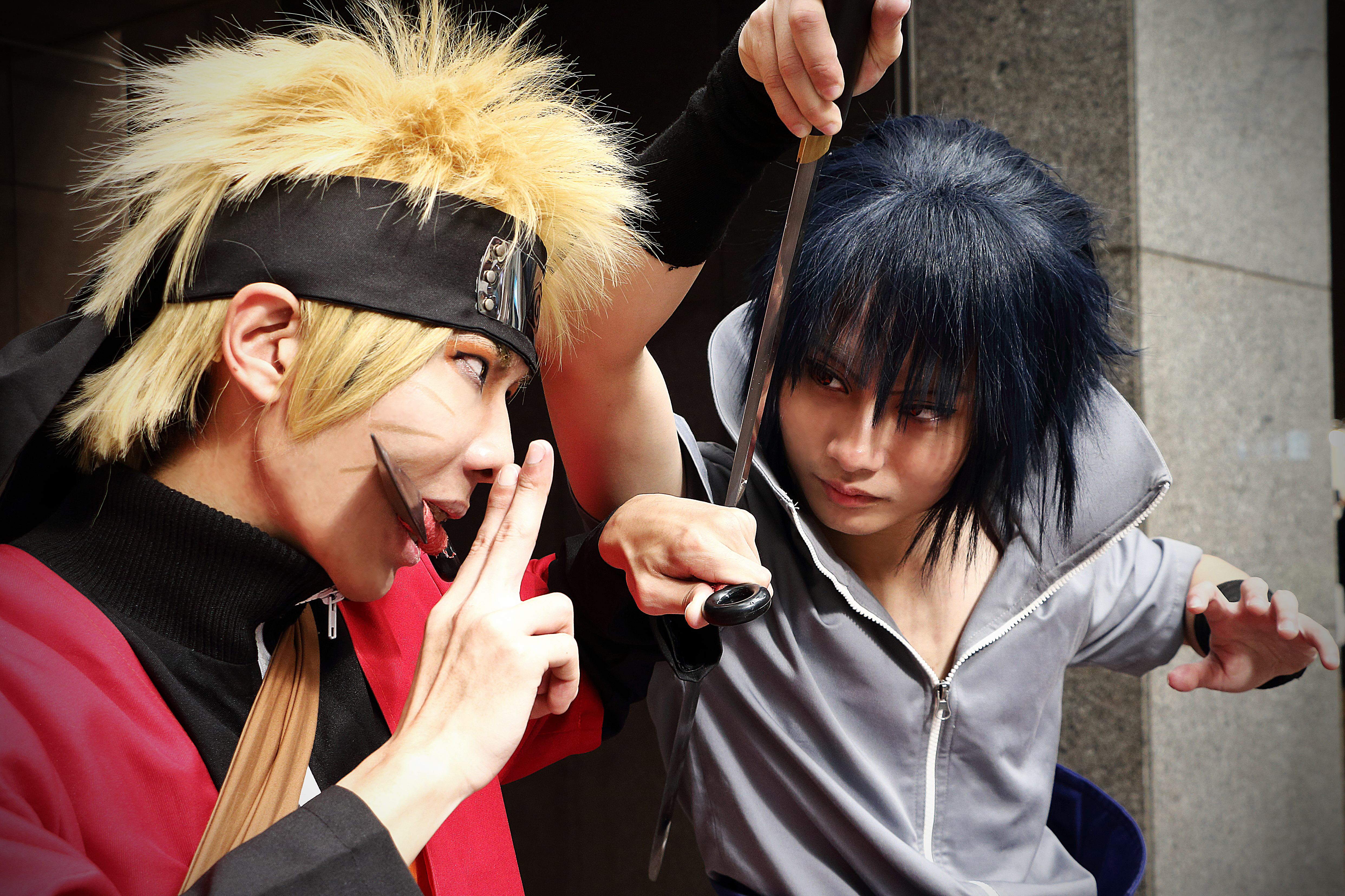 2016台北市政府動漫嘉年華，阿迪（左）、茂貓（右）cosplay《火影忍者》漩渦鳴人、宇智波佐助。